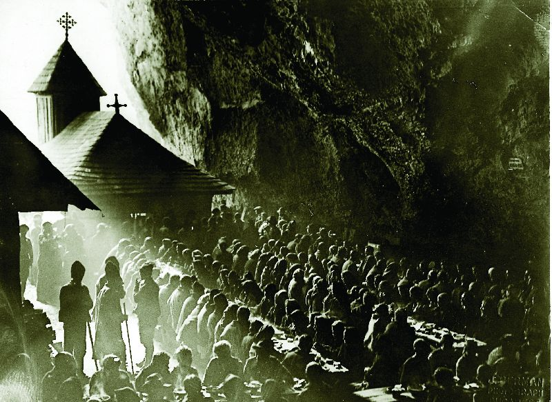 Praznic la mănăstire